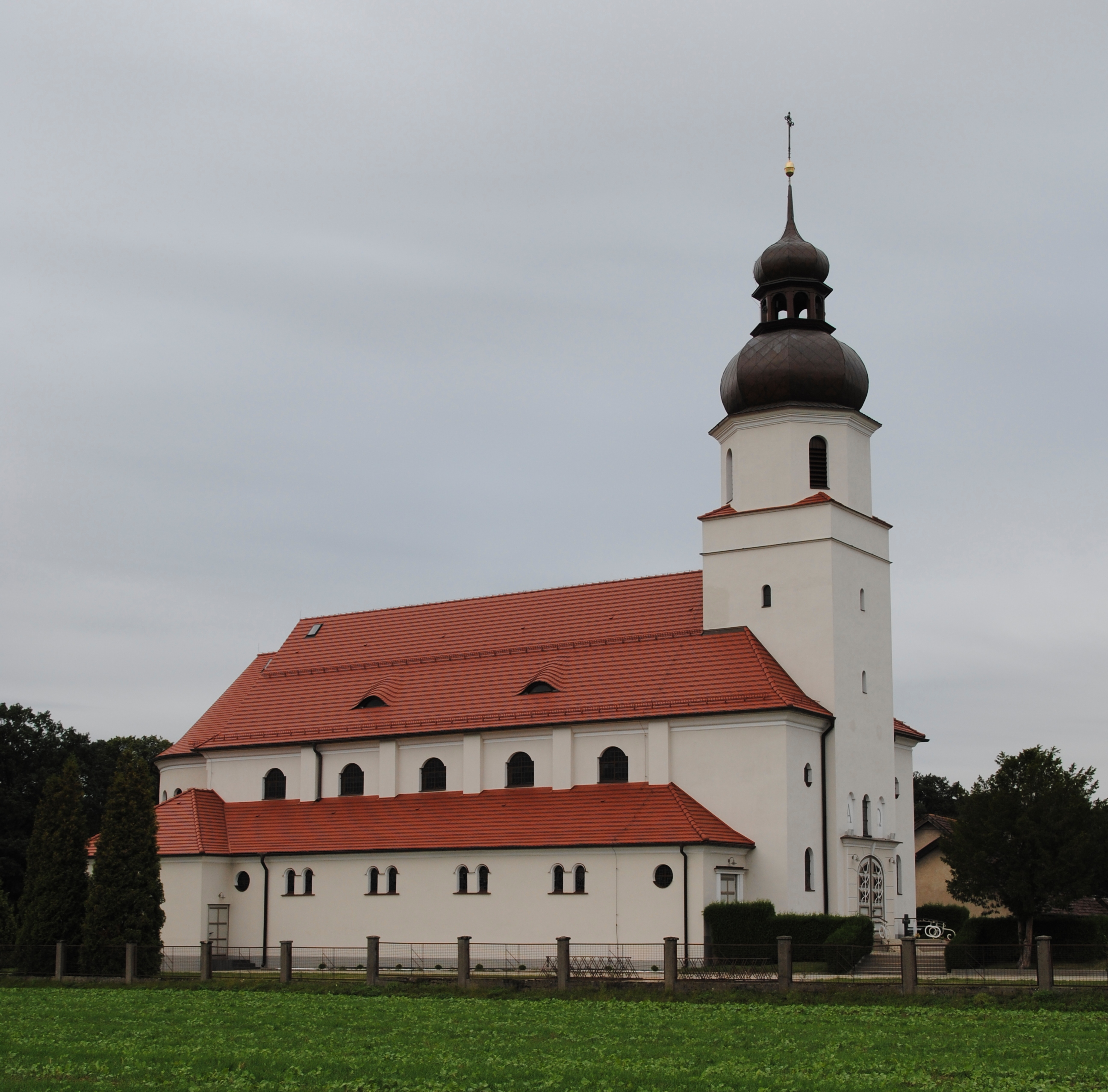 Węgry - rzymskokatolicki kościół parafialny pw. św. Józefa Robotnika, 1938-1939